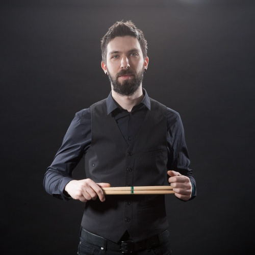 барабаны